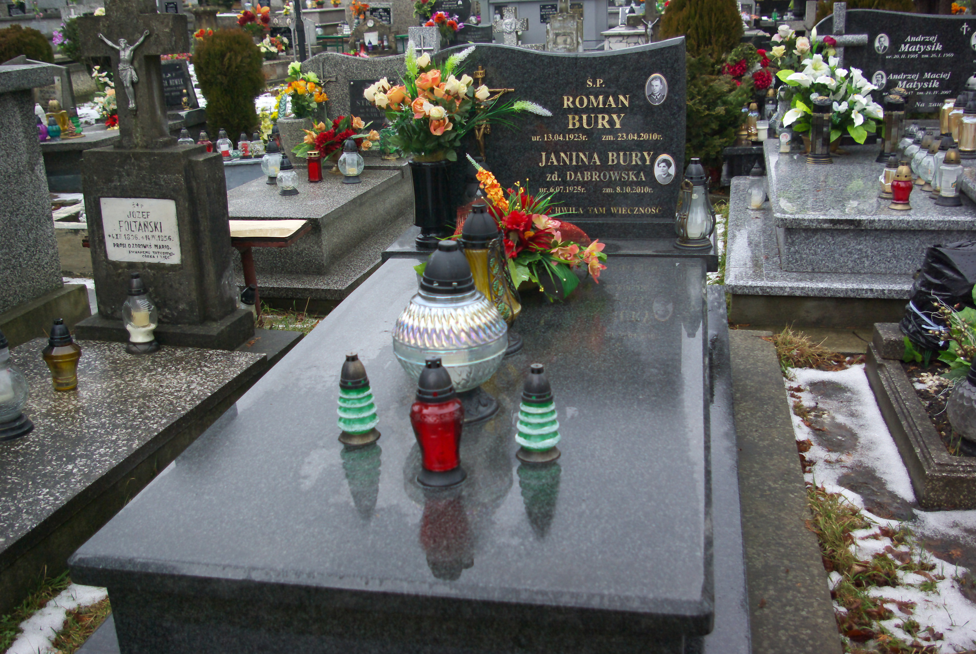 Nagrobek Janiny i Romana Bury w części „Rymanowski Stary” Cmentarza Centralnego w Sanoku.